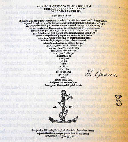 Adagiorum chiliades, edizione veneziana di Aldo Manuzio 1508